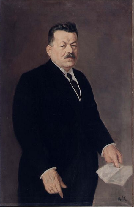 Bildnis des Reichspräsidenten Friedrich Ebert von Emil Orlik